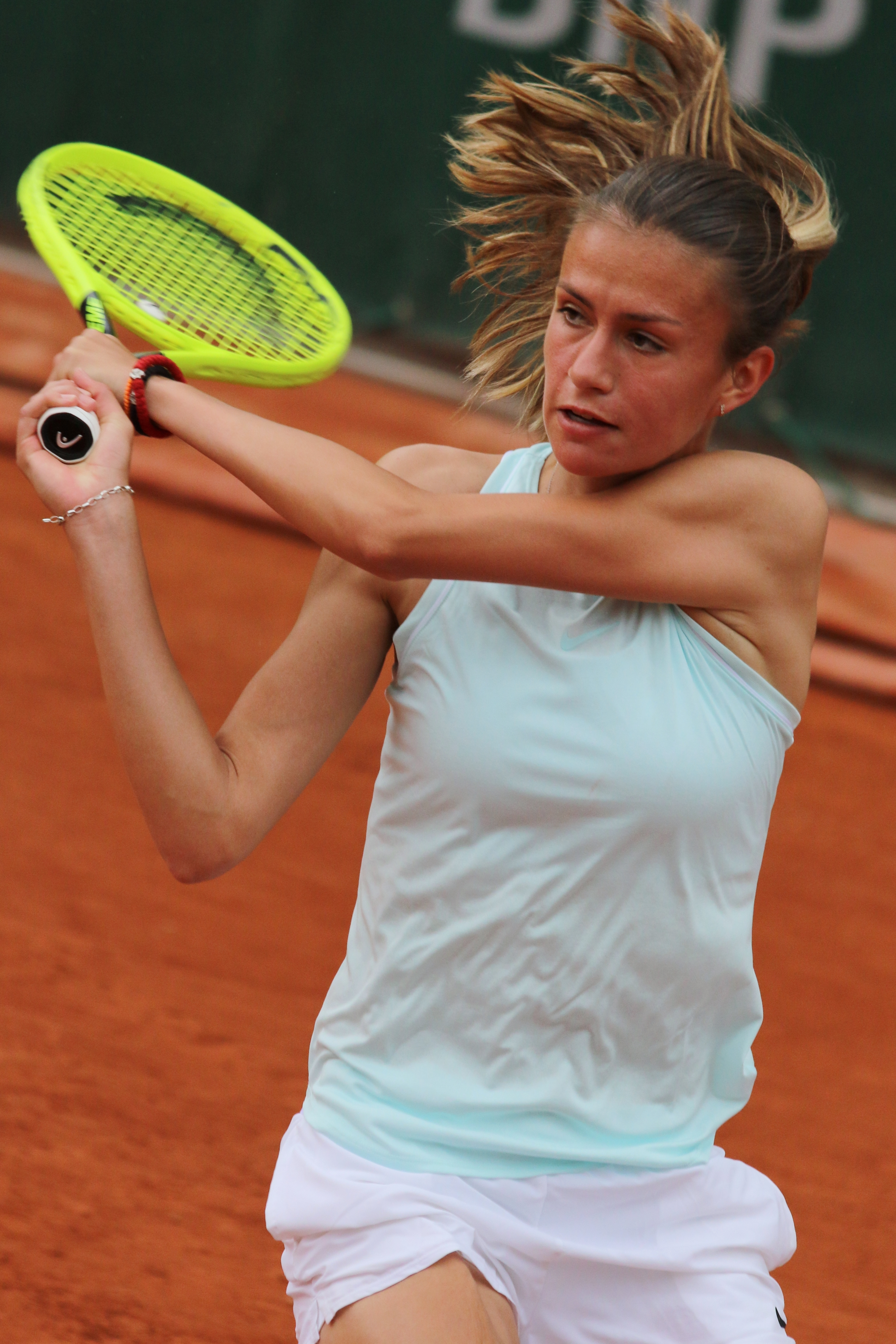 Janicijevic RG19 (28)